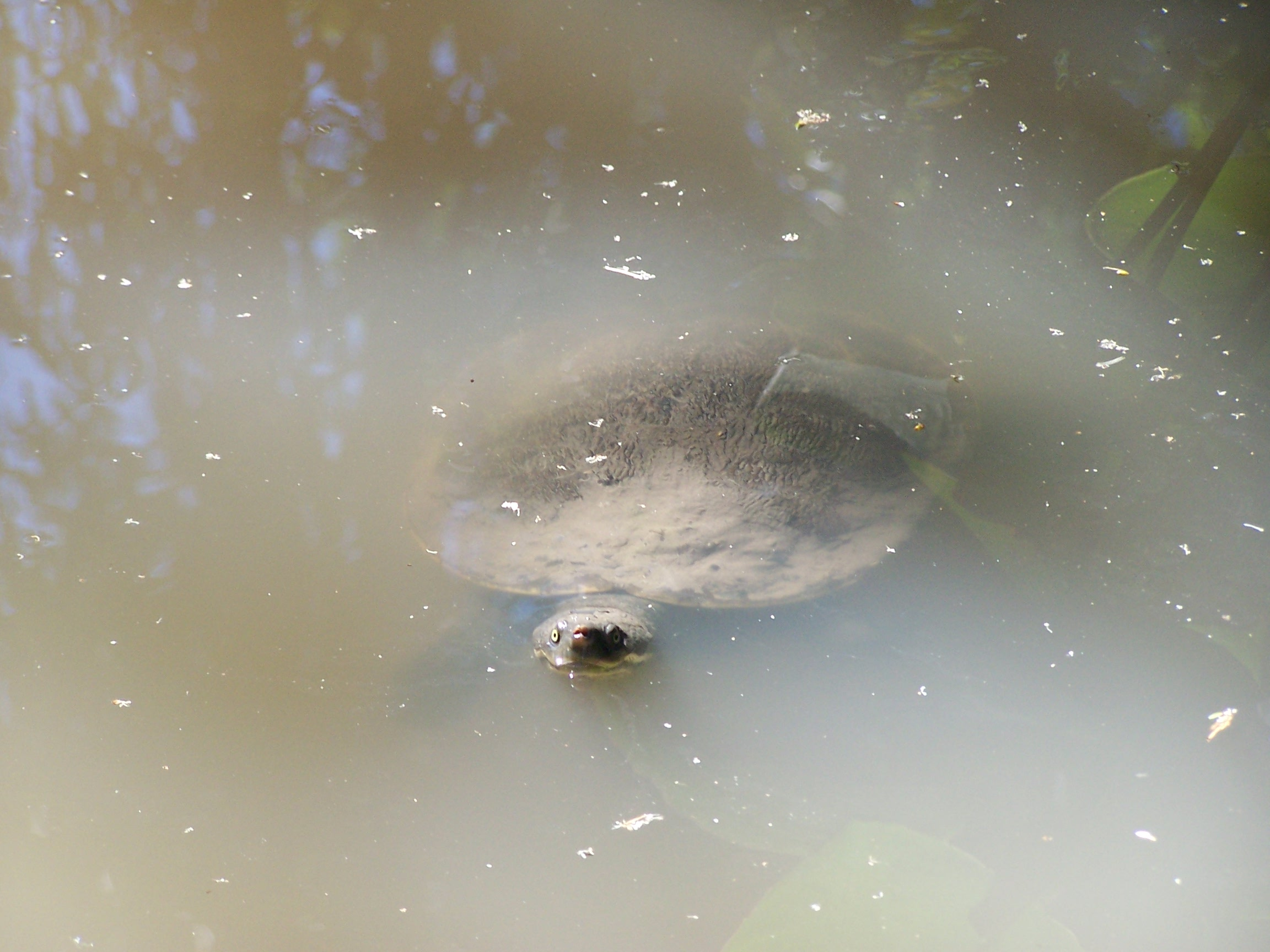 Australia Zoo Mary-River-Schildkröte